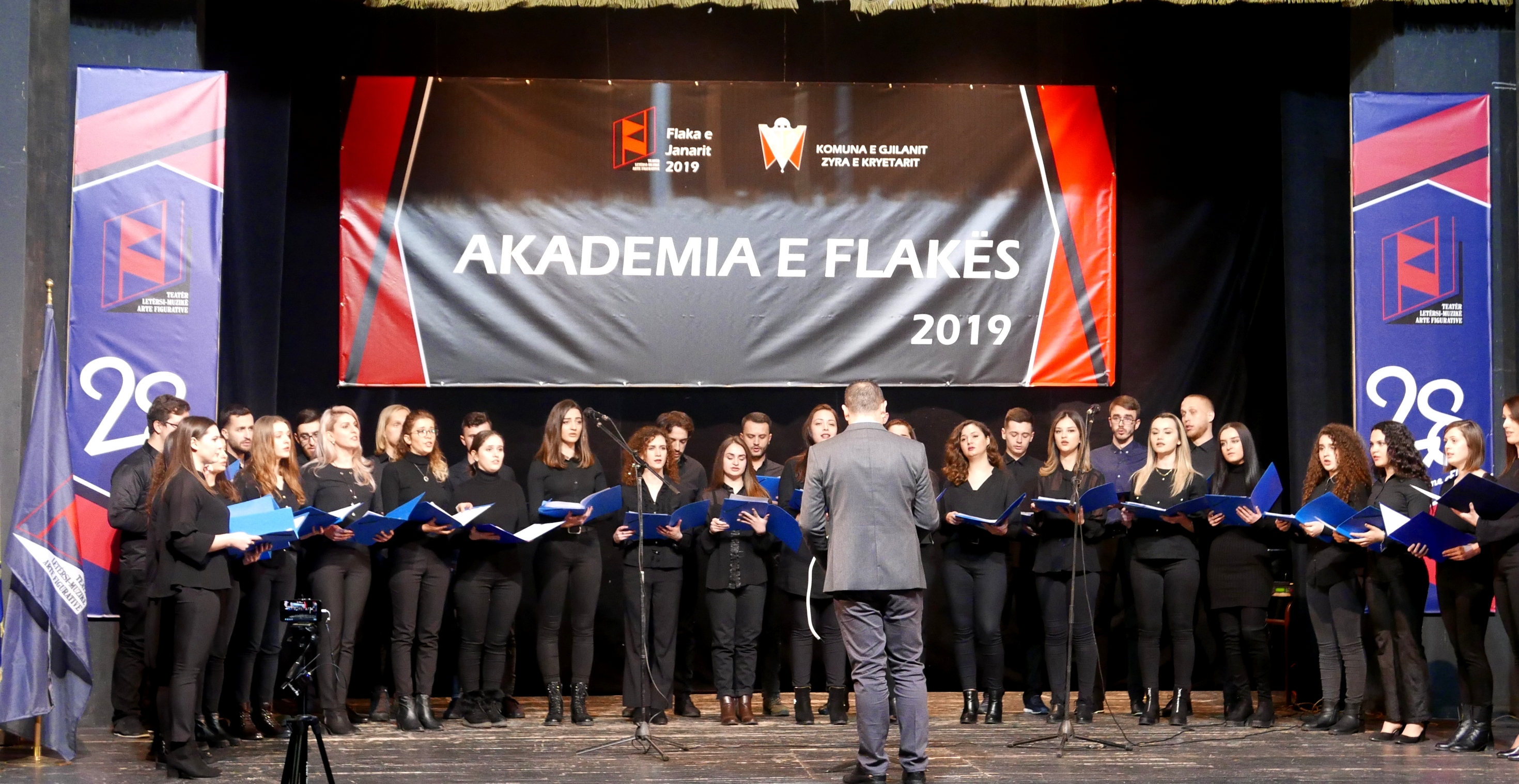 Manifestimi Flaka e Janrit 2019